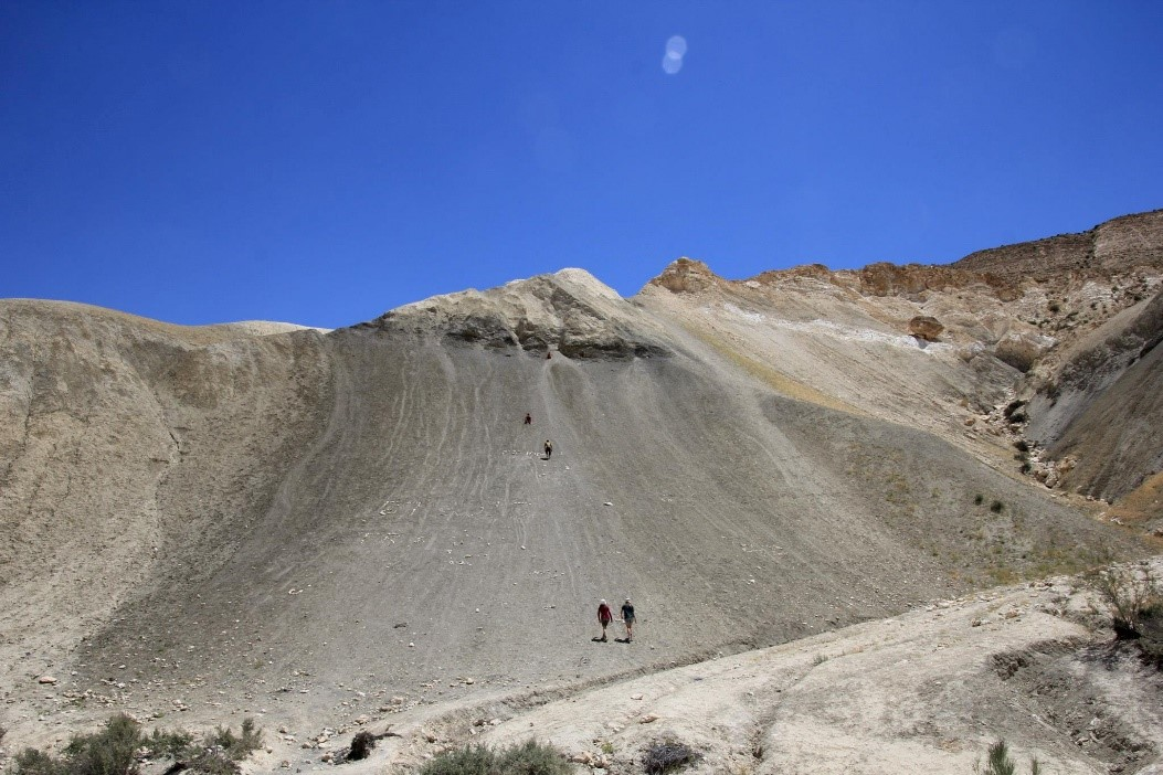 דיונת הסכין השחורה בנחל חווארים